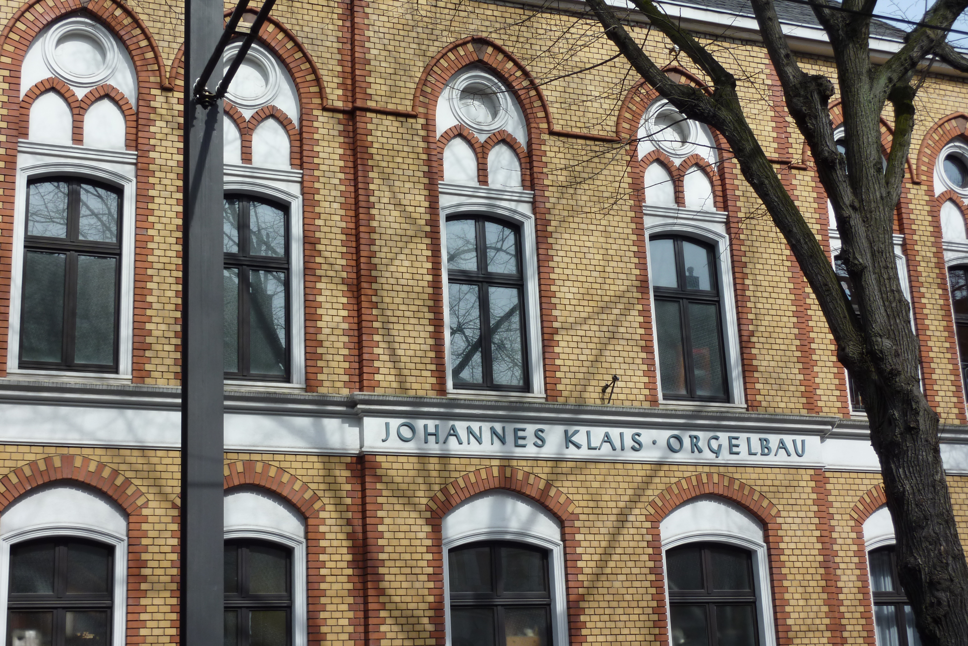 Johannes Klais Orgelbau GmbH & Co. KG, Kölnstraße 148, Bonn